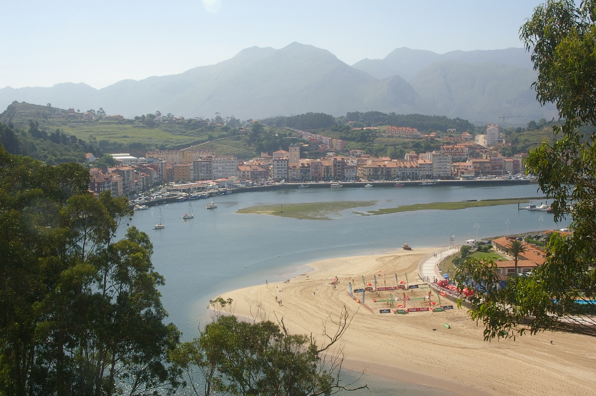 Stadtansicht und Hafen Ribadesella